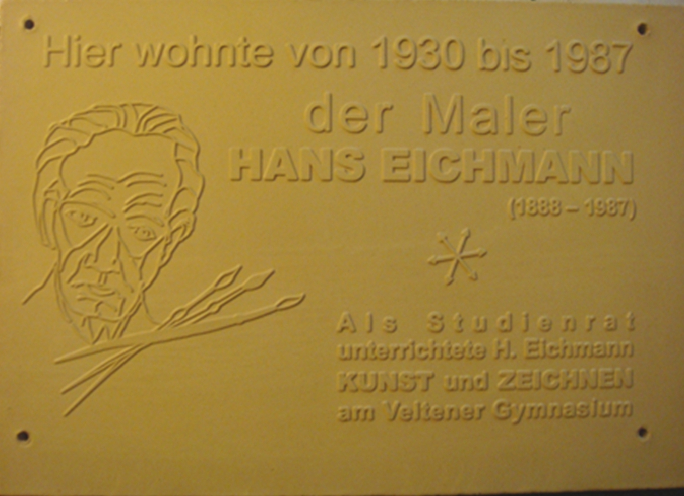 Am 21. Mai 2015 wurde diese Gedenktafel für den Maler Hans Eichmann, an seinem Wohnhaus in Velten Viktoriastraße 56A, als öffentliche Würdigung seines künstlerischen Wirkens, mit einem feierlichen Akt angebracht.